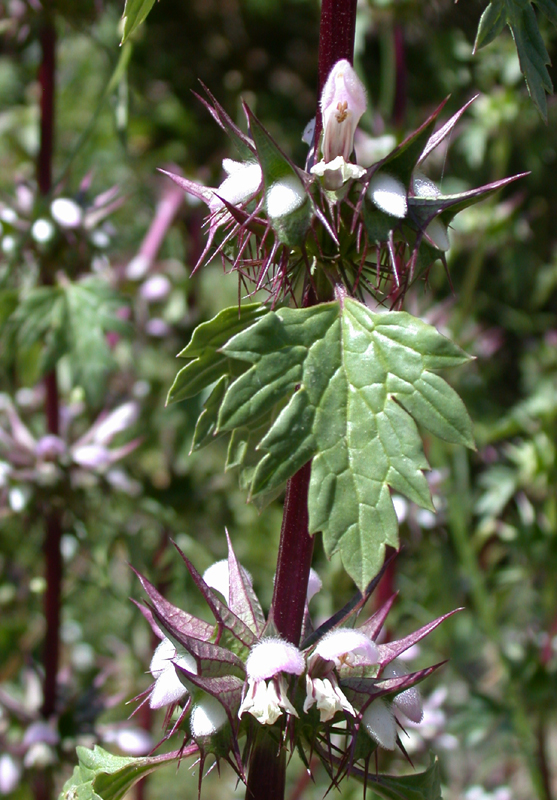 Moluccella spinosa L. (בר-גביע קוצני), Mount Carmel, Israel, May 2006.